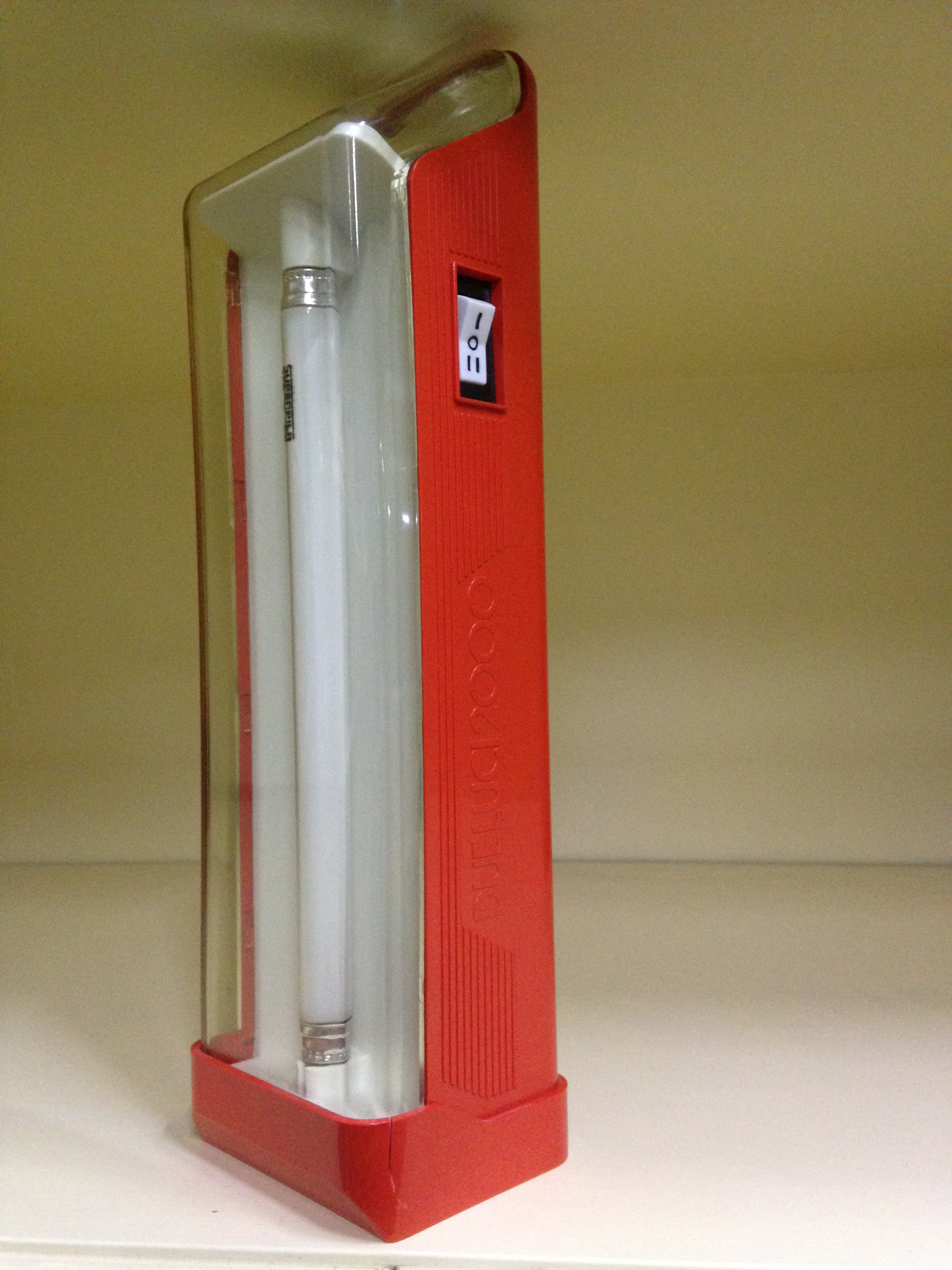 Fonte: lavoro proprio su oggetto in possesso: Lampada Dueluci 2000. Prototipo.